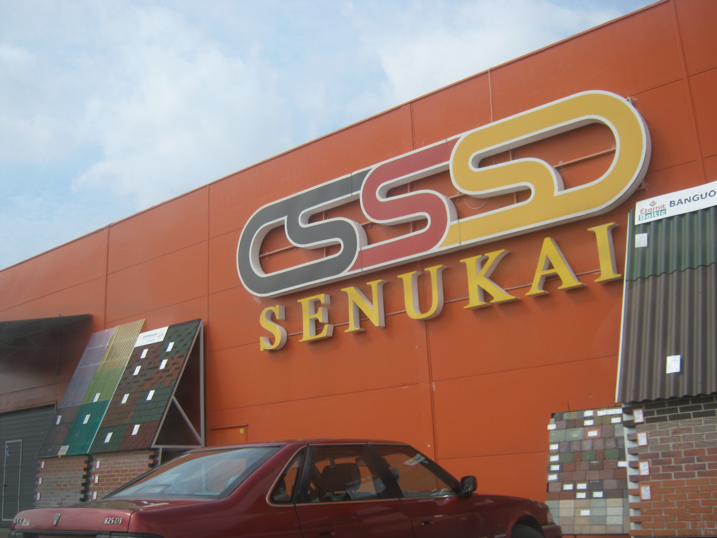 Kaišiadorys